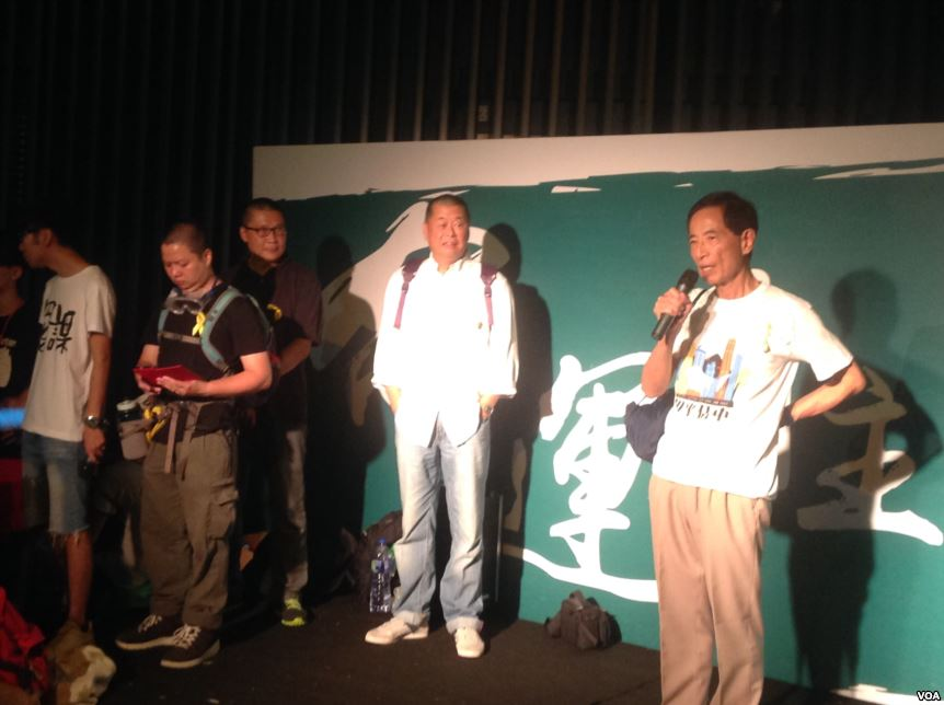 中文（台灣）: 和平佔領中環行動星期天淩晨正式啟動